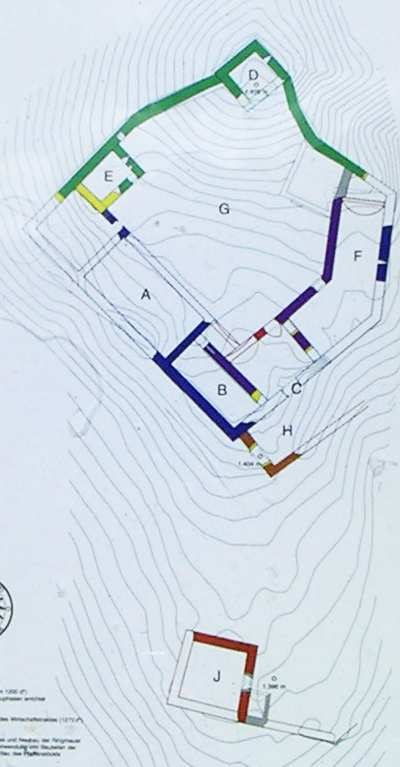 Burgruine Rabenstein, Infotafel der Burg Rabenstein